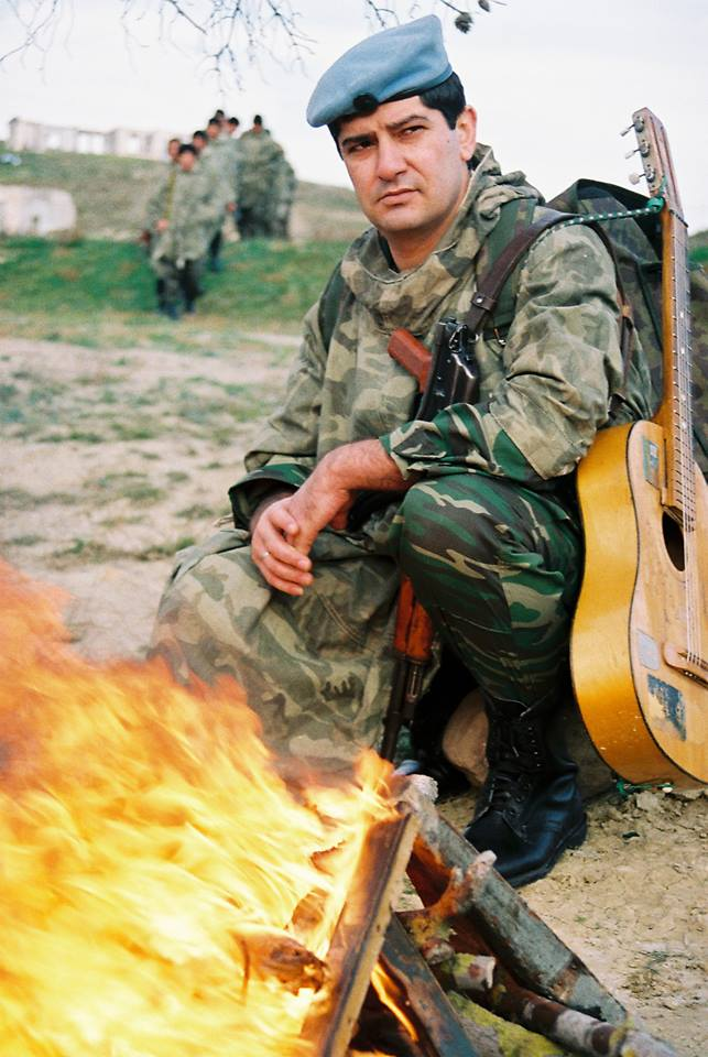 Шамистан Ализаманлы